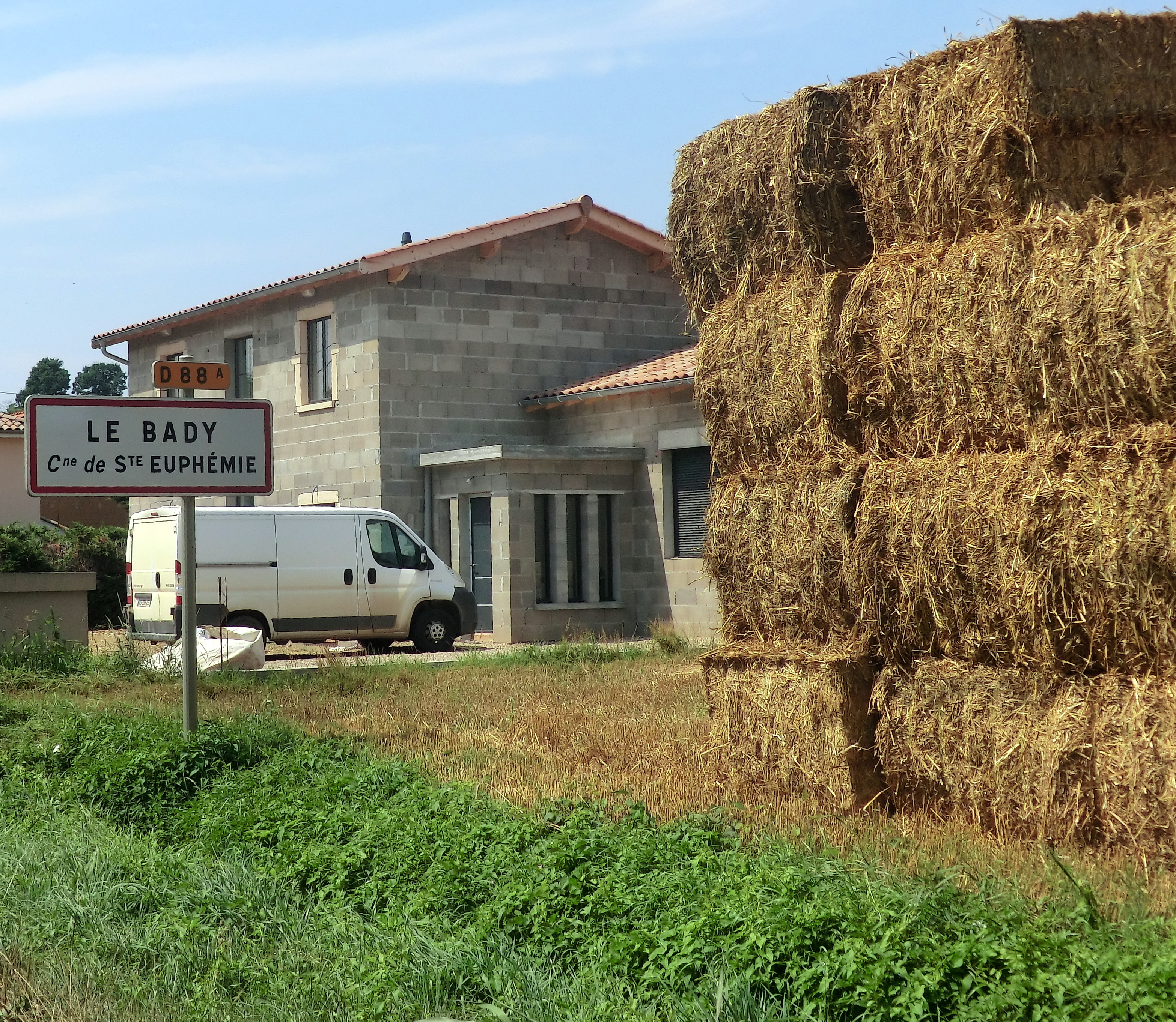 Panneau du hameau Le Bady (Sainte-Euphémie).